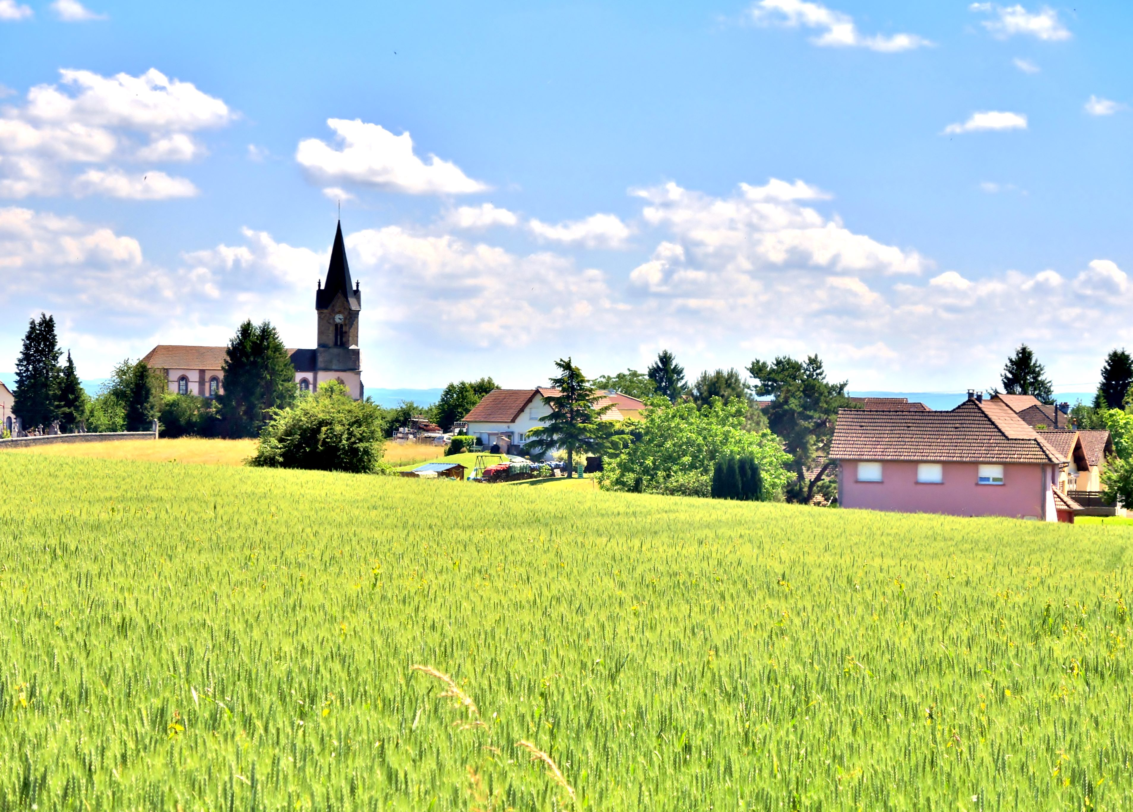 Centre du village de Bessoncourt, vu du chemin stratégique. Territoire de Belfort